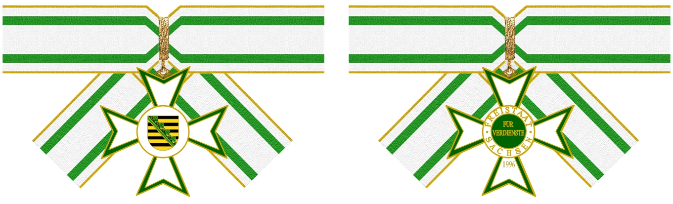 Ein Sächsischer Verdienstorden (Damenausführung) in einer grafischen Darstellung.